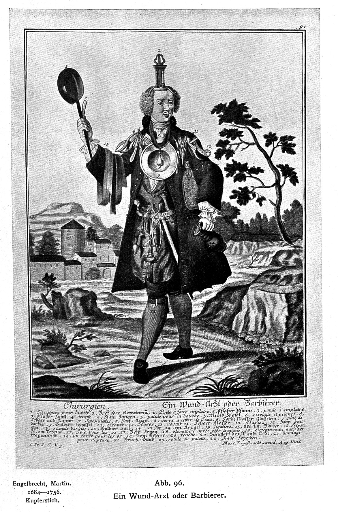 Cartoon "Ein Wund-Arzt oder Barbierer" General Collections Keywords: barbers; Physicians; Martin Engelbrecht; Martin Engelbrecht